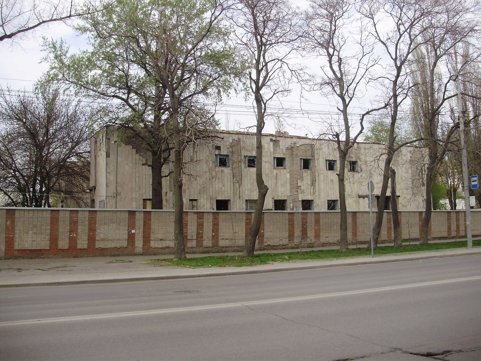 Бывшая Соборная мечеть в Ростове-на-Дону, ул. Красноармейская 97.